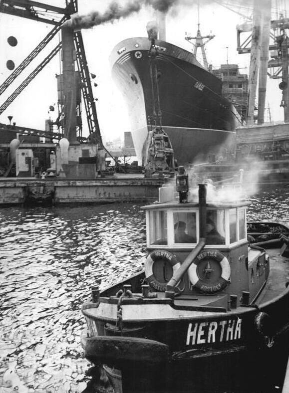 Rostock, Neptunwerft, Ausrüstungskai Zentralbild Karnitzki 20.3.1965 Echte Hafenatmosphäre strahlt am Ausrüstungskai der Rostocker Neptunwerft vielen Besuchern des Ostseebezirks bei einer Fahrt über die Warnow entgegen. (Im Hintergrund ein Schiff vom Typ 201 für die Sowjetunion am Ausrüstungskai)